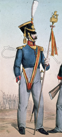 Soldado leonífero de 4630 MADRID ARCHIVO HISTORICO MILITAR UNIFORMES MILITARES S XIX (1821)